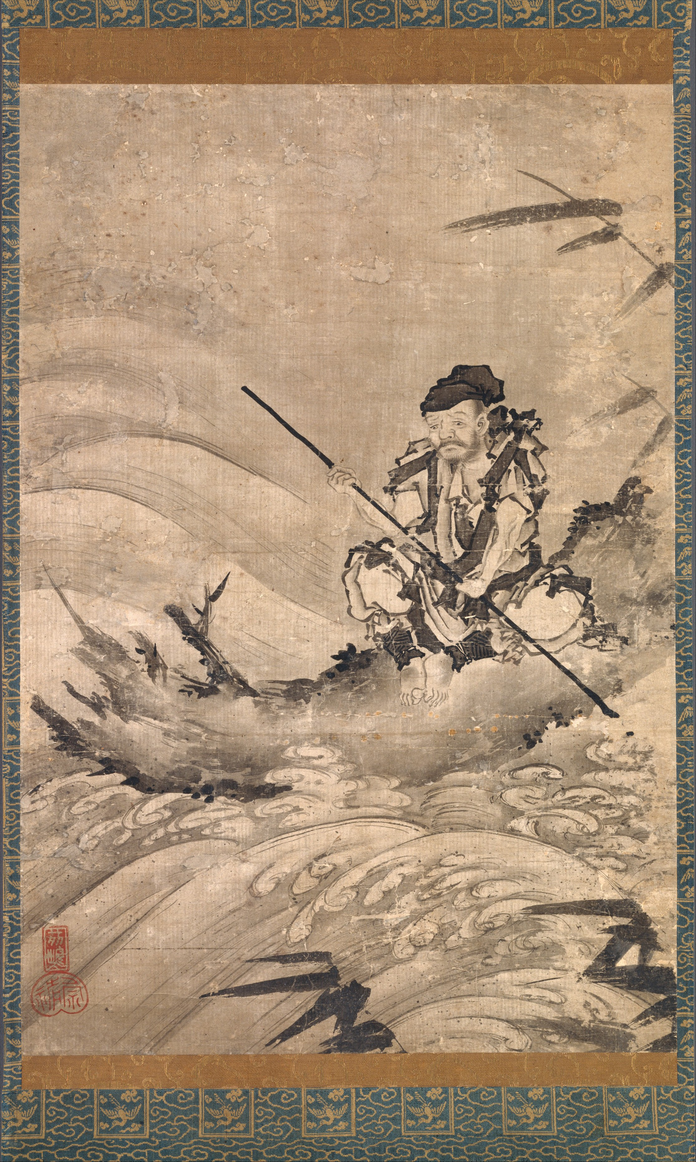 Japan; Hanging scroll; Paintings